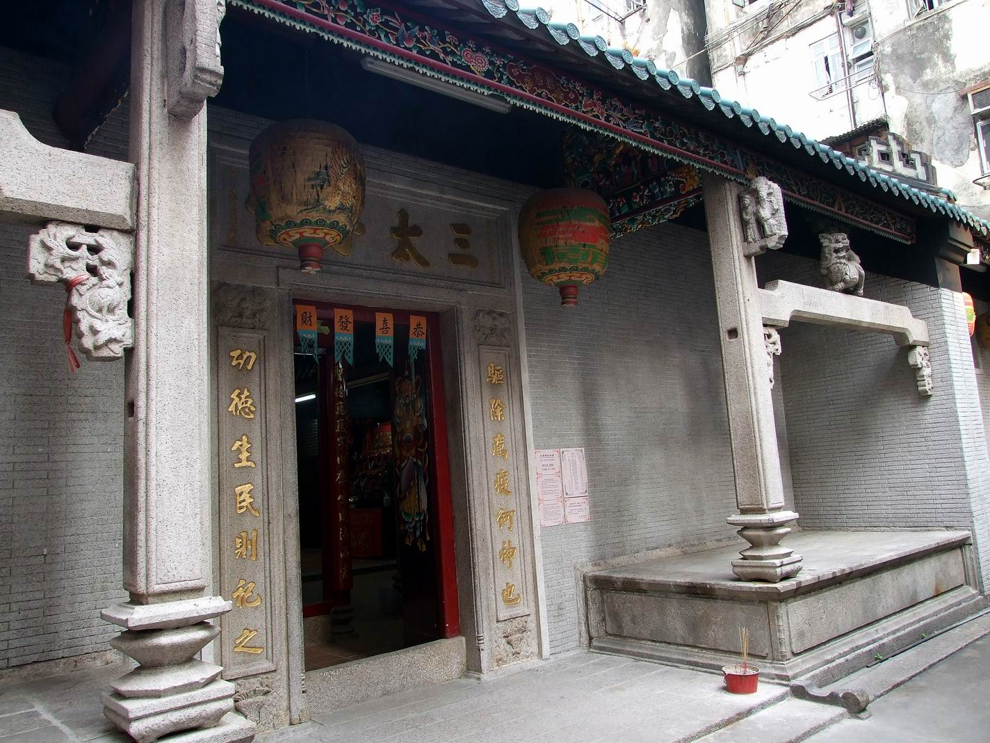 深水埗三太子廟